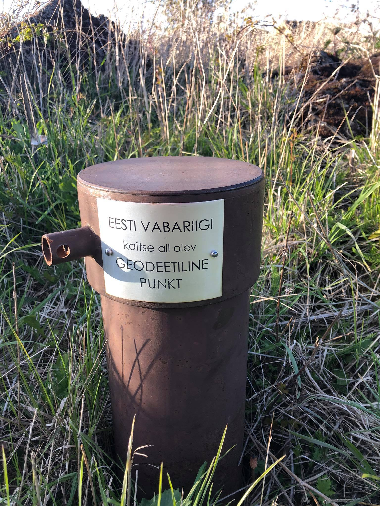 Kopli külas asuv geodeetiline punkt.